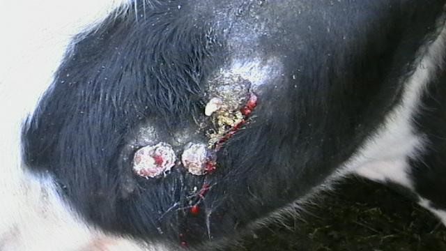 actinomycosis of a 3-years-old bull, 2-months evolution : thick matter (up) and old fistules granulomas. Walon: actinomicôze d' on gayet d' 3 ans, k' a duré deus moes : sûnaedje d' ene sipesse matire (å dzeu) et nocrês ås plaeces des vîs trawaedjes (portrait saetchî pa L. Mahin).